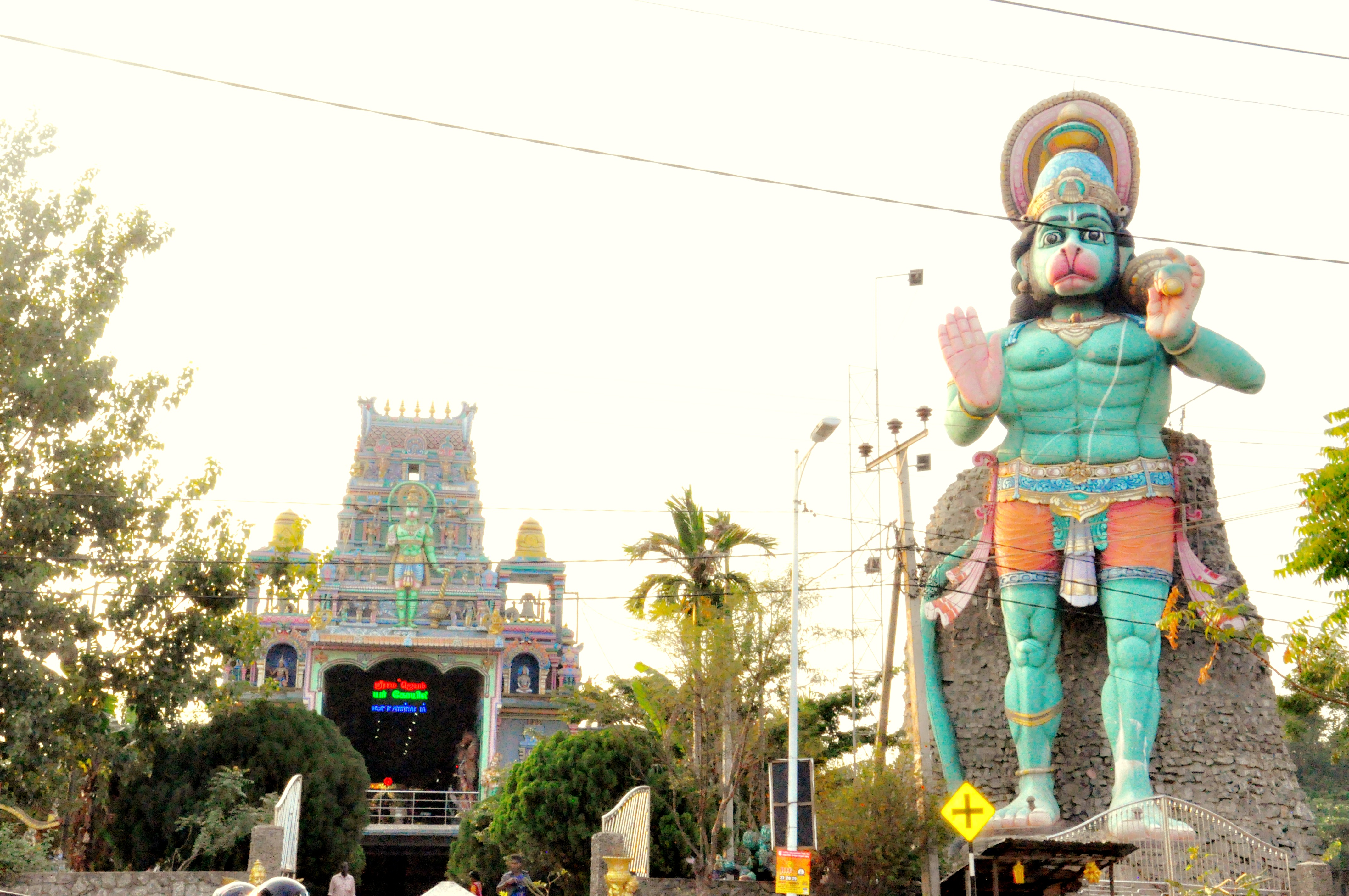 ஆஞ்சநேய கோவிலின் முகப்பு தோற்றம்